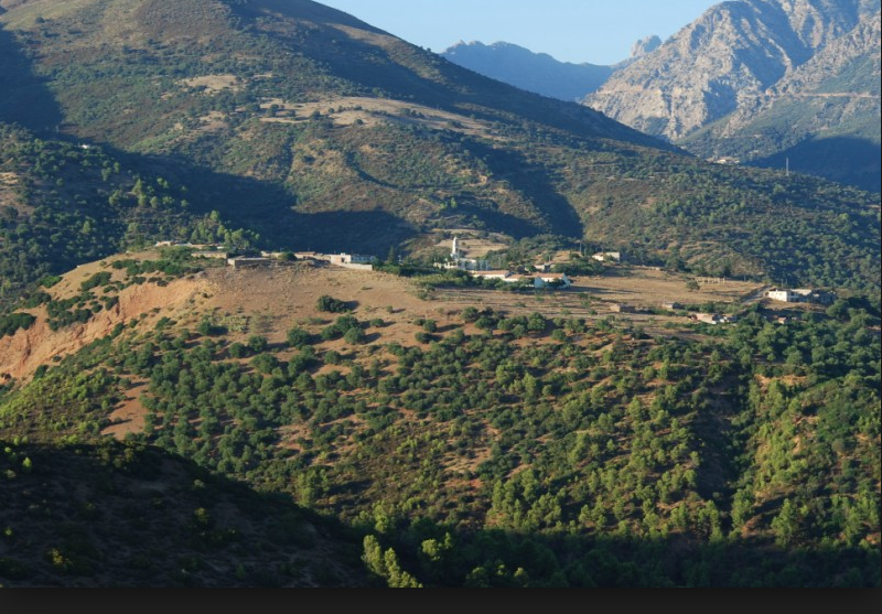 Agouillal vue global